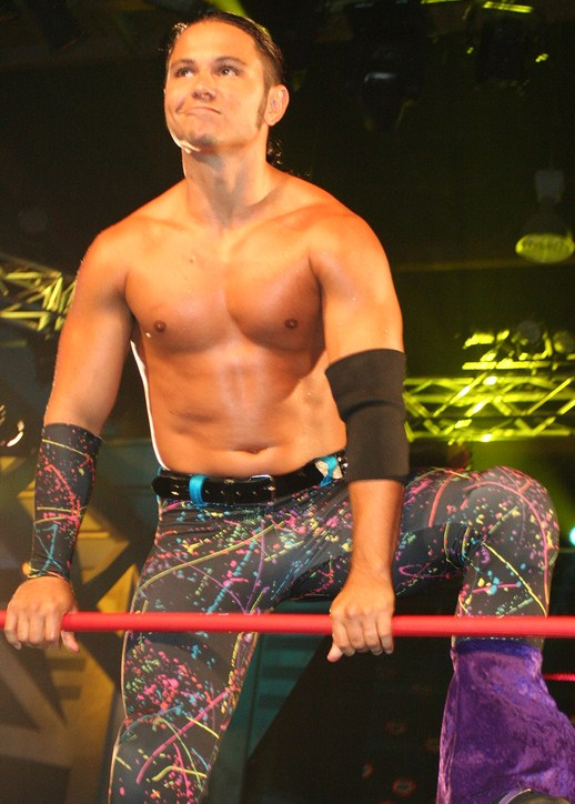 Generation ME